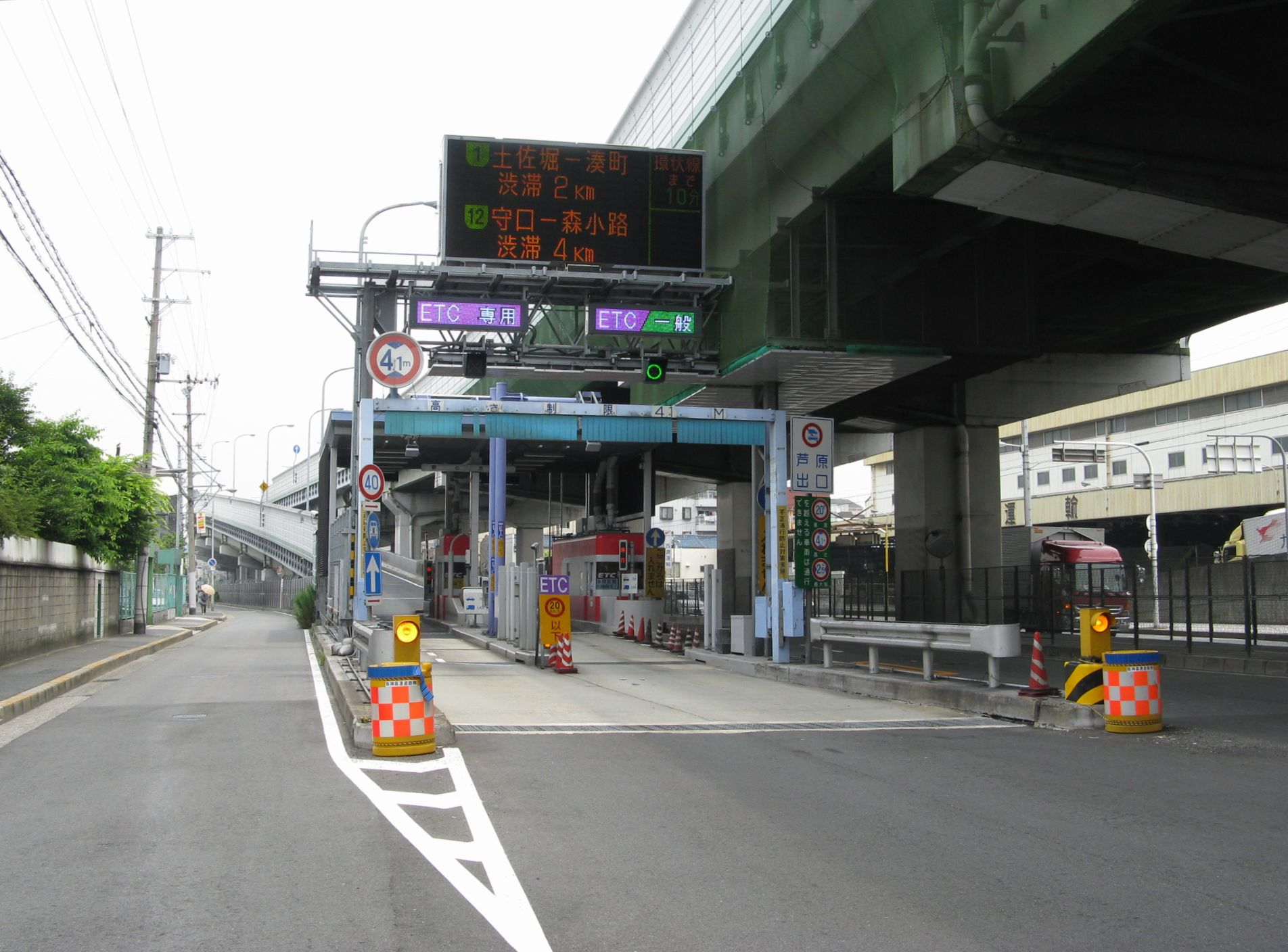 阪神高速玉出出入口 北行入口を北望